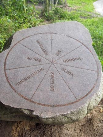 Zevenmarkensteen bij De Kiel, Schoonoord